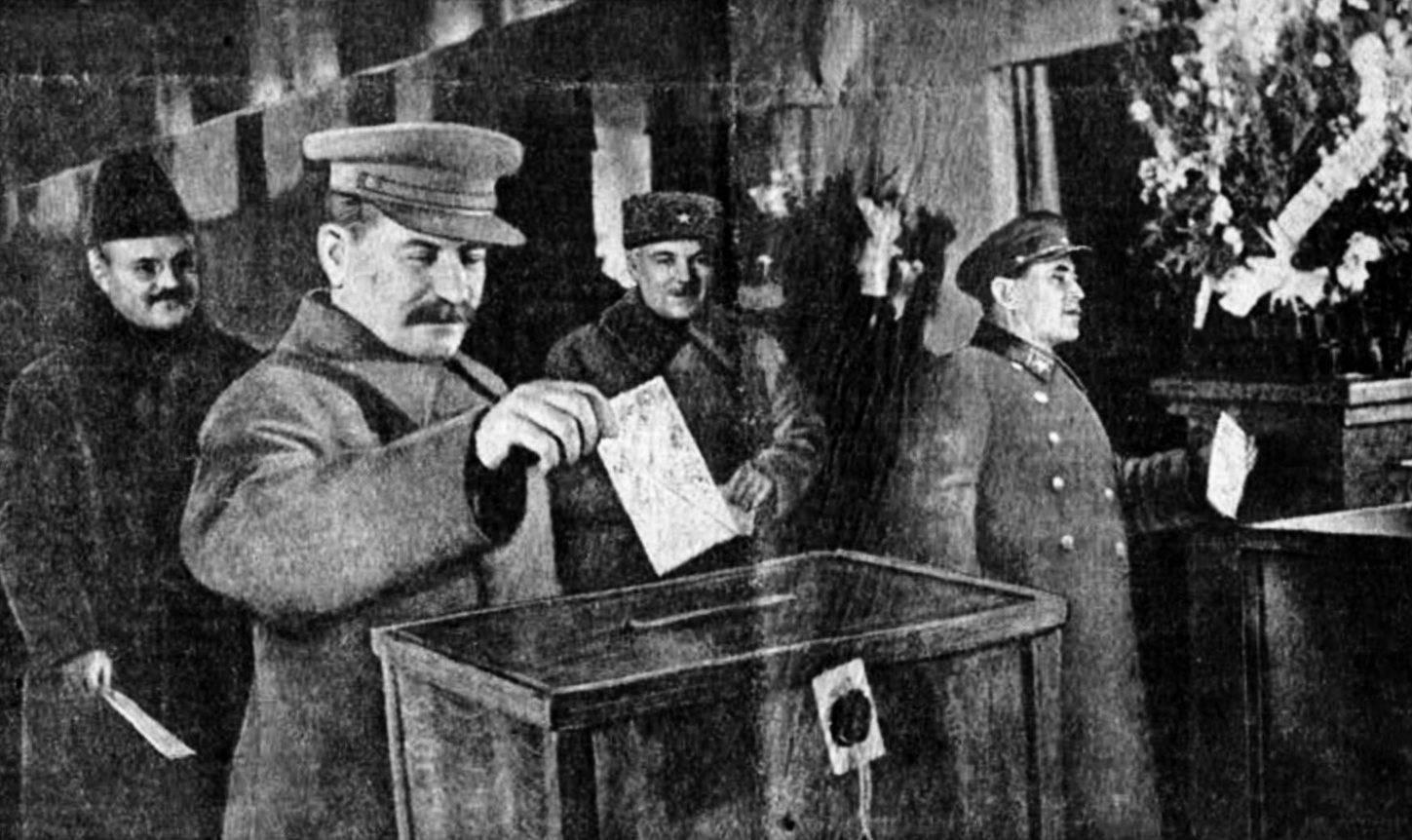 Товарищи Сталин, Молотов, Ворошилов и Ежов голосуют [на выборах в Верховный Совет СССР] в 58-м участке Ленинского избирательного округа гор. Москвы (дек. 1937)